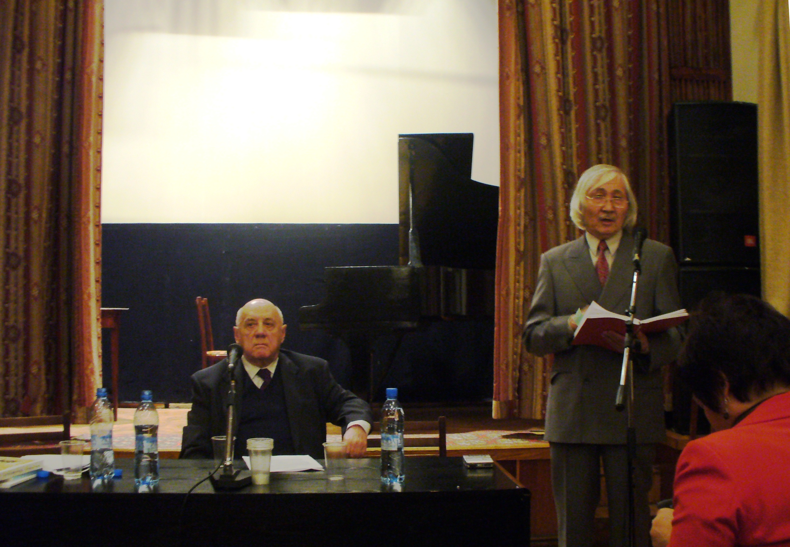 Москва, Презентация книги Мураталиева Мусы "Идол и Мария".